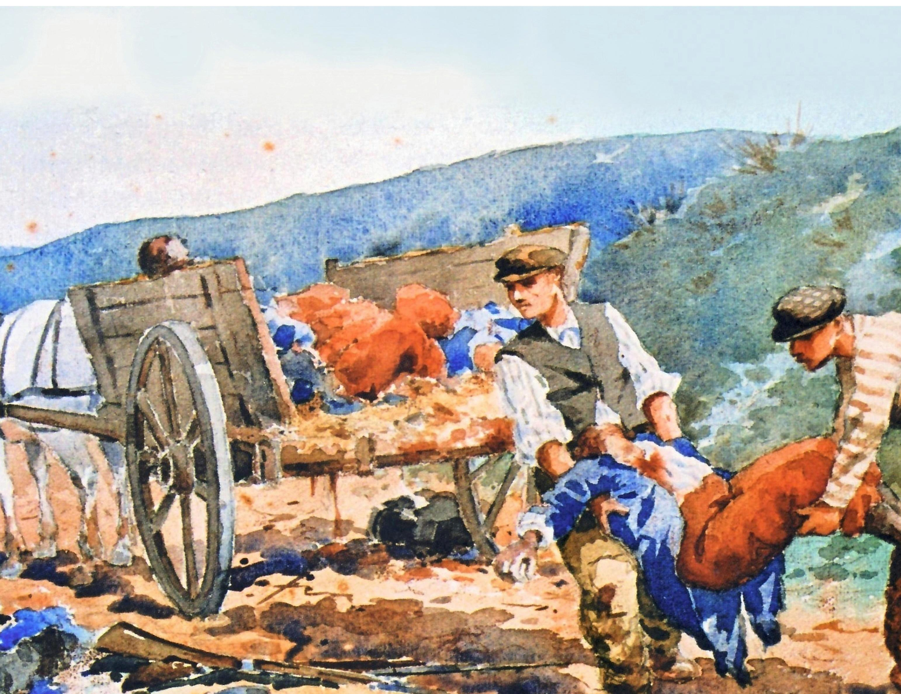 "Après la bataille". Acuarela de Nestor Outer